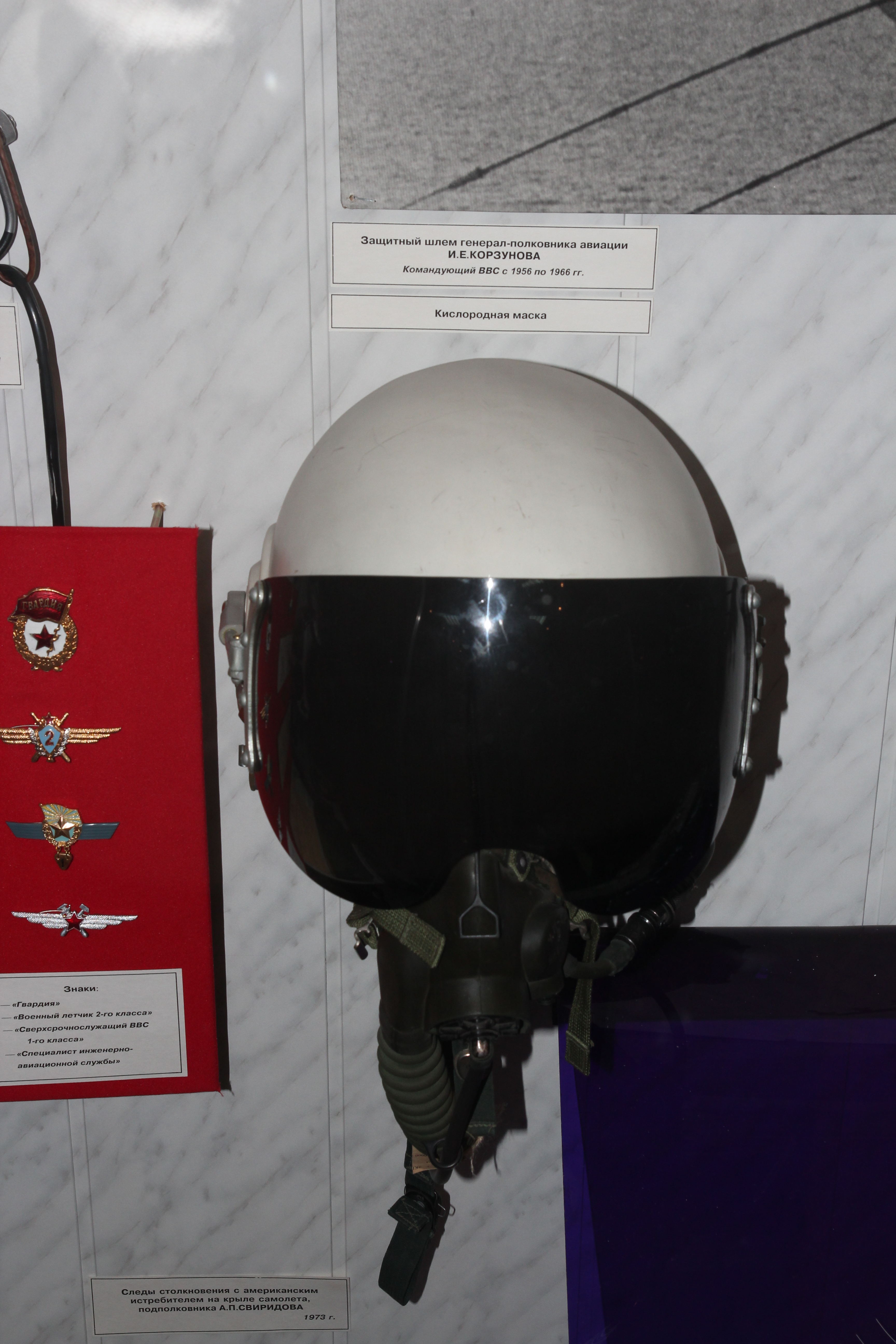 Защитный шлем И. Е. Корзунова